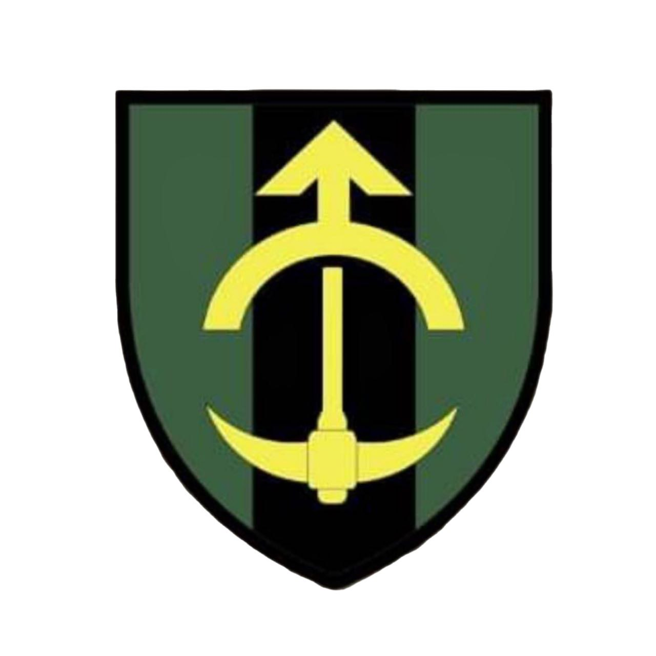 офіційний шеврон БОСП "гуцульський корпус", на ньому зображений олекса довбуш і напис-девіз підрозділу - слова Т. Шевченко